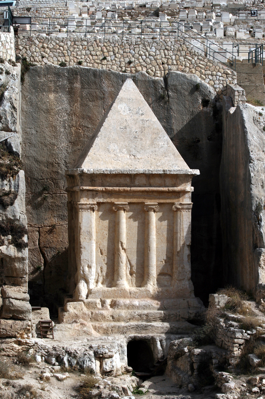 Pyramide de Zacharie à Jerusalem